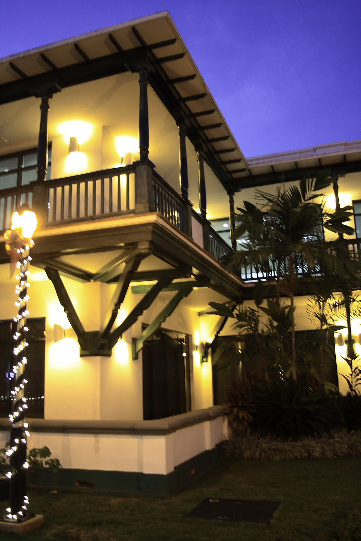 Las Laras era la antigua sede de la Shell en Maracaibo, el cuartel de operaciones de este campo petrolero. El nombre se refería a unos cuatro samanes o "laras", que adornaban su entrada y las esquinas del edificio. Este edificio junto con otros más que formaban parte del campo son patrimonio cultural del estado y de la nación. Este edificio estuvo abandonado un tiempo y creo que hasta sufrió un incendio, hasta que hace unos años se inició su recuperación.